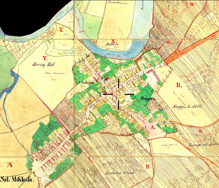 19. századi térképrészlet: Szentmiklósfa és Pápóc